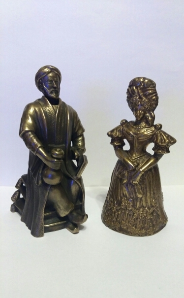 Слева – кивающий колокольчик (nodder), справа – колокольчик-фигурка (lady bell)